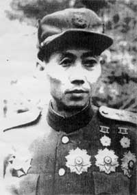 조선민주주의인민공화국의 군인 방호산